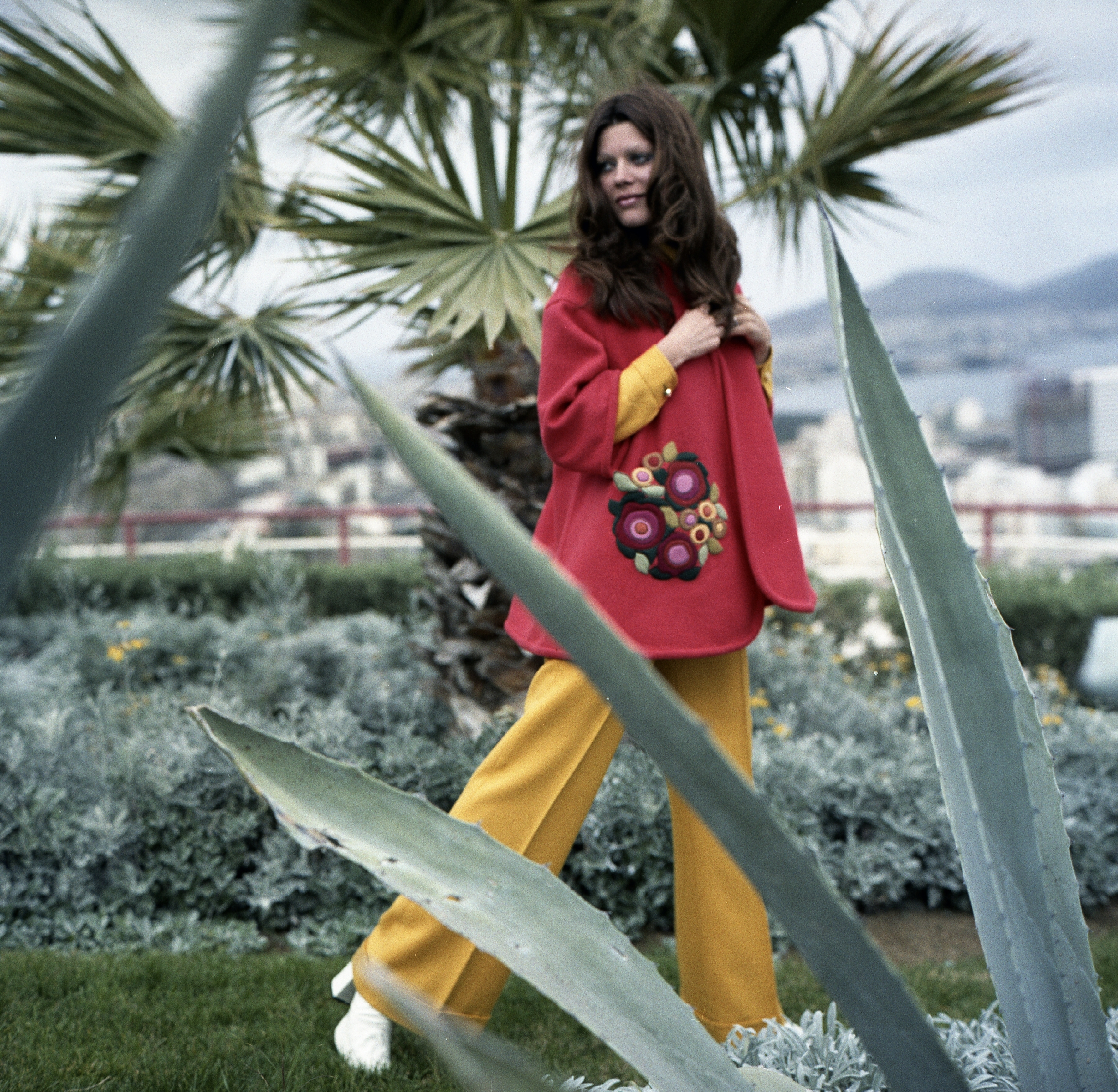 Calle Sierra Nevada, Felkai Anikó manöken. Location: Spain, Canary Islands Tags: colorful, fashion, palm tree Title: Calle Sierra Nevada, Felkai Anikó manöken.